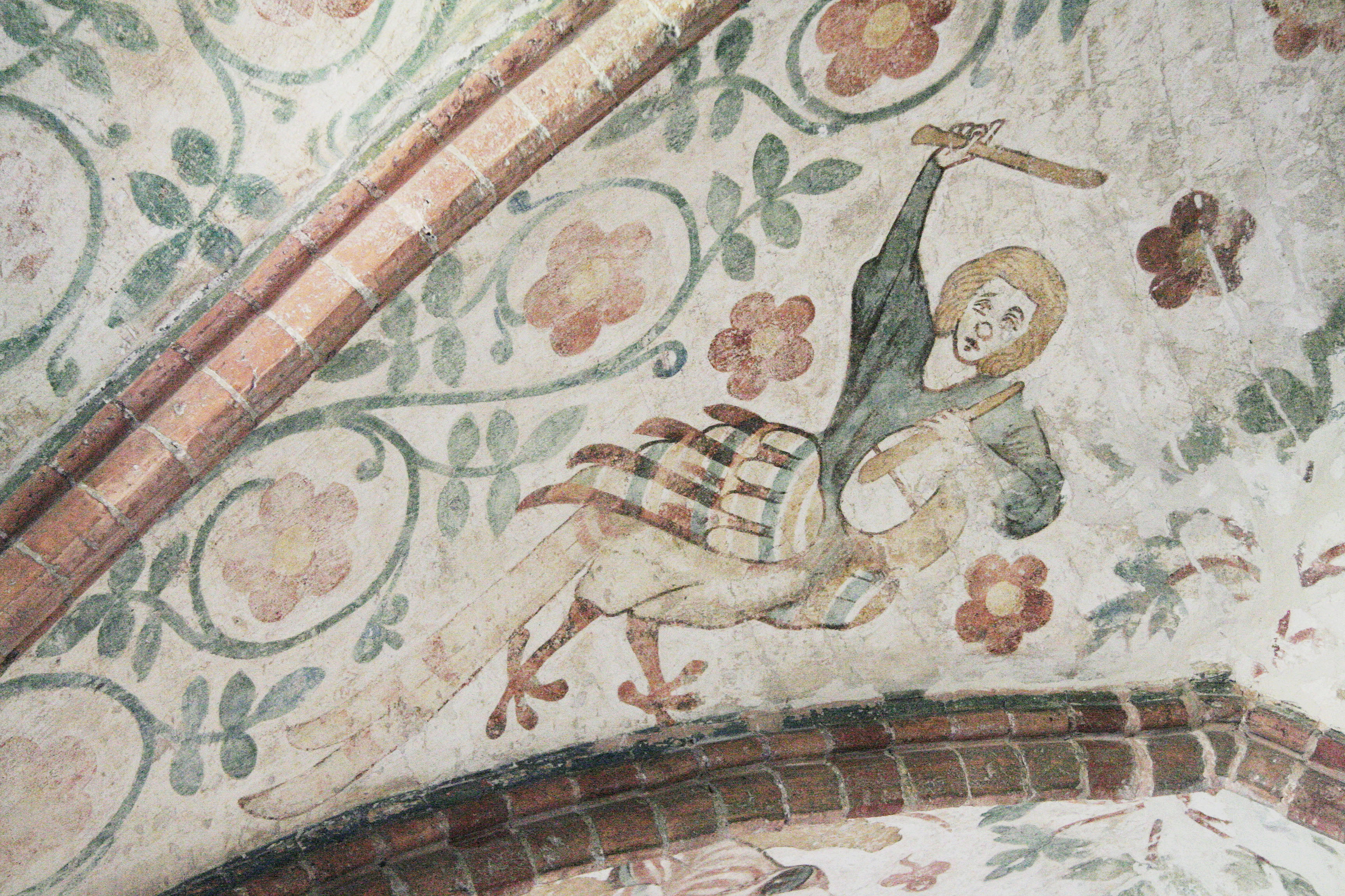 Ausschnitt der Deckenmalerei im südlichen Flügel des Schwahls, Kreuzgang im Schleswiger Dom